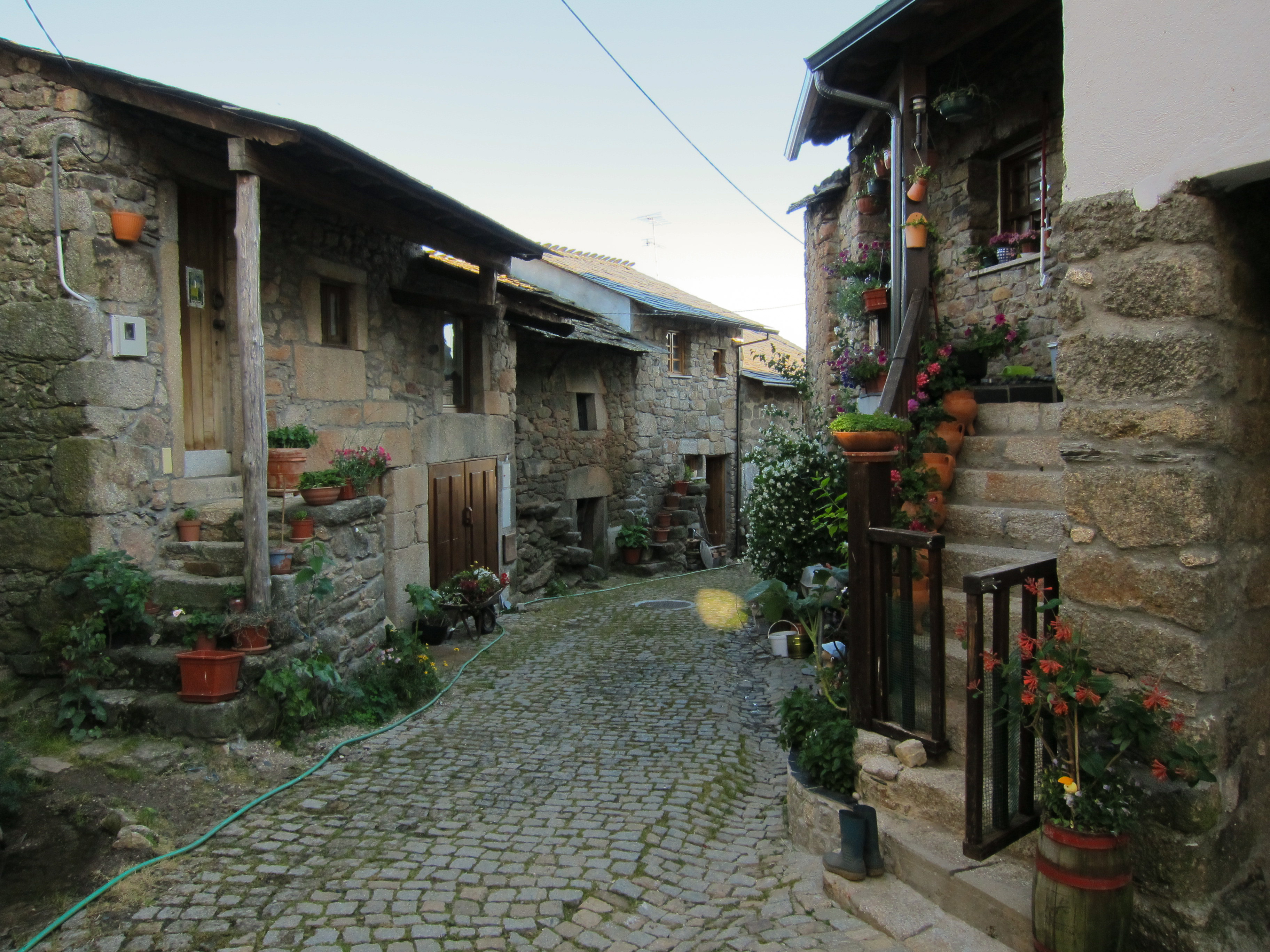 Aldeia de Montesinho